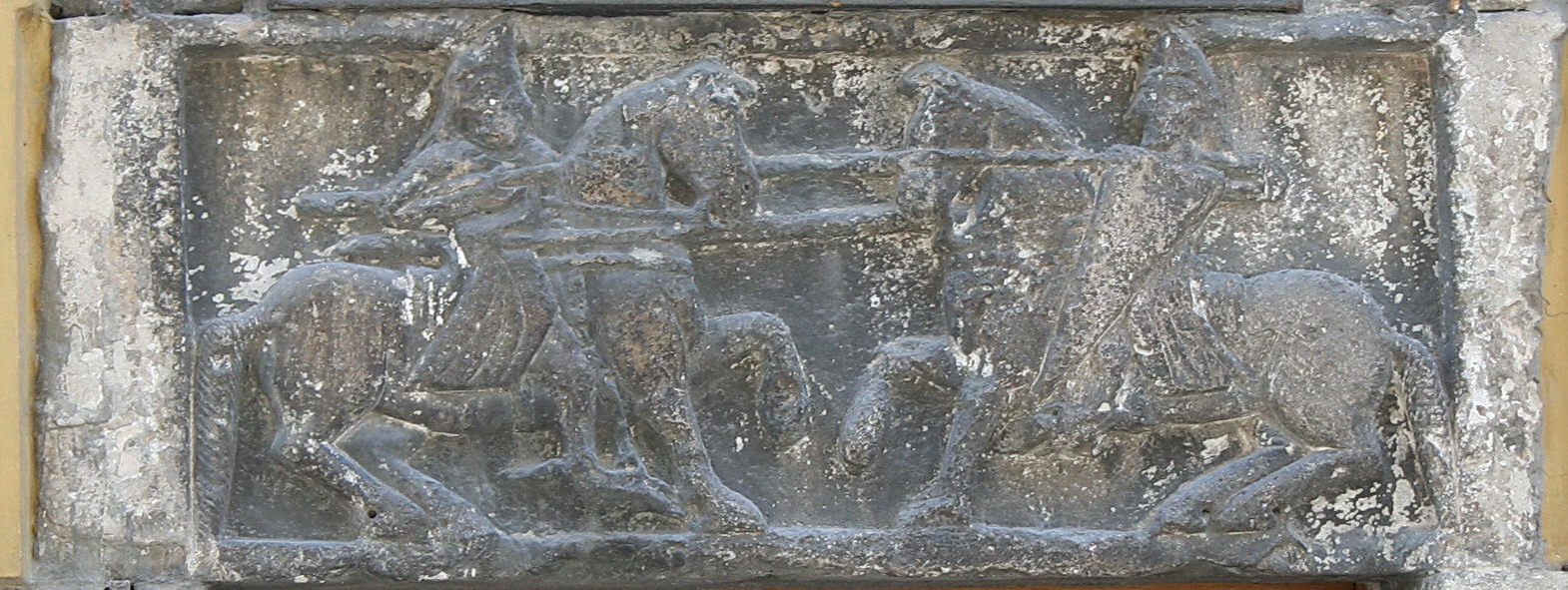 Iconografia di cavalieri giostranti scolpita sul travertino della "Edicola Dugentesca" di Corso Mazzini di Ascoli Piceno.